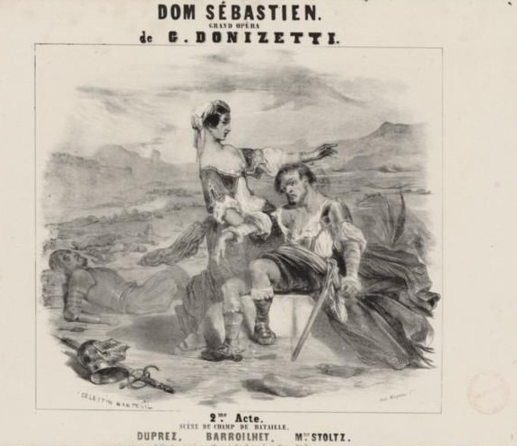 Dom Sébastien, grand opéra de Donizetti. 2.me acte. Scène du champ de bataille. Duprez, Barroilhet, M.me Stoltz